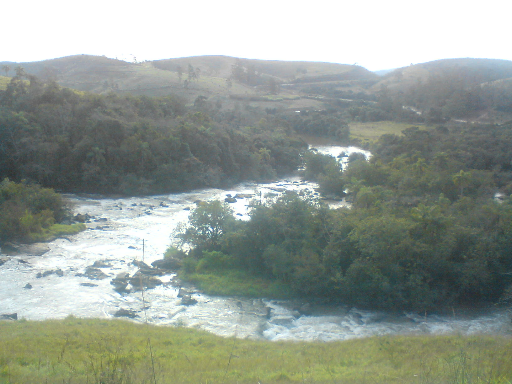 Planalto de Poços de Caldas